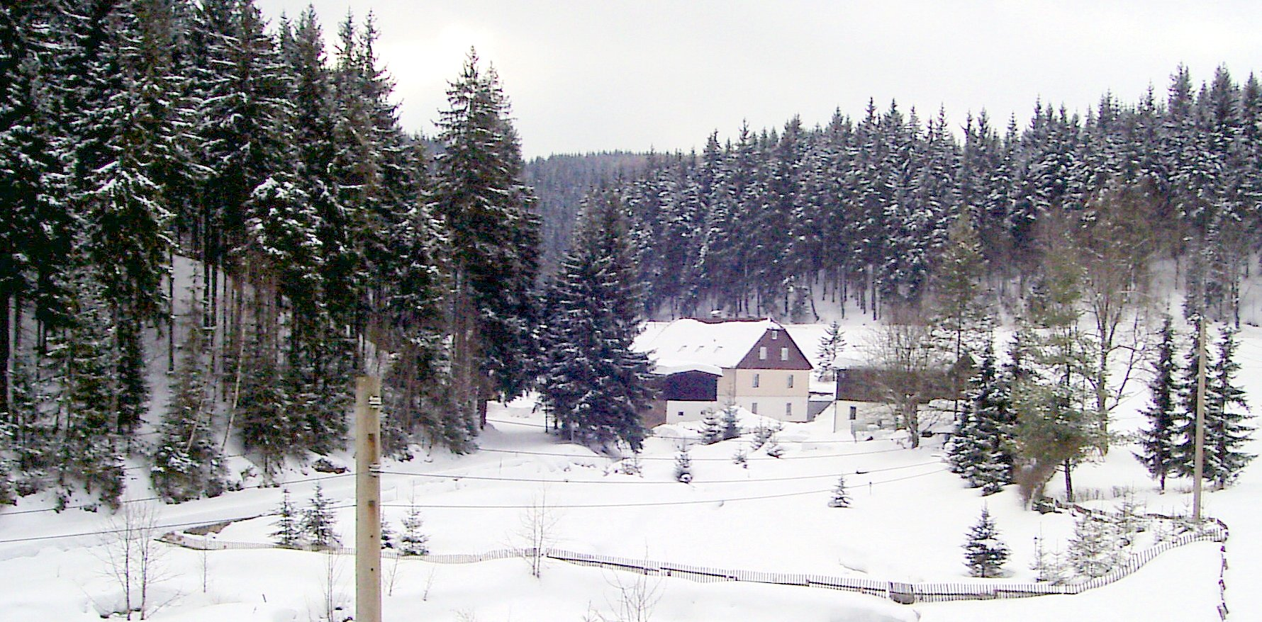 Natzschungtal zwischen Rübenau und Rothental, Erzgebirge, Deutschland/Tschechien